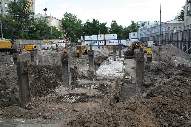 В 2007 году в Москве на Хохловской площади в ходе работ по строительству парковки было обнаружено основание крепостной стены Белого города. Площадь находится на Покровском бульваре.